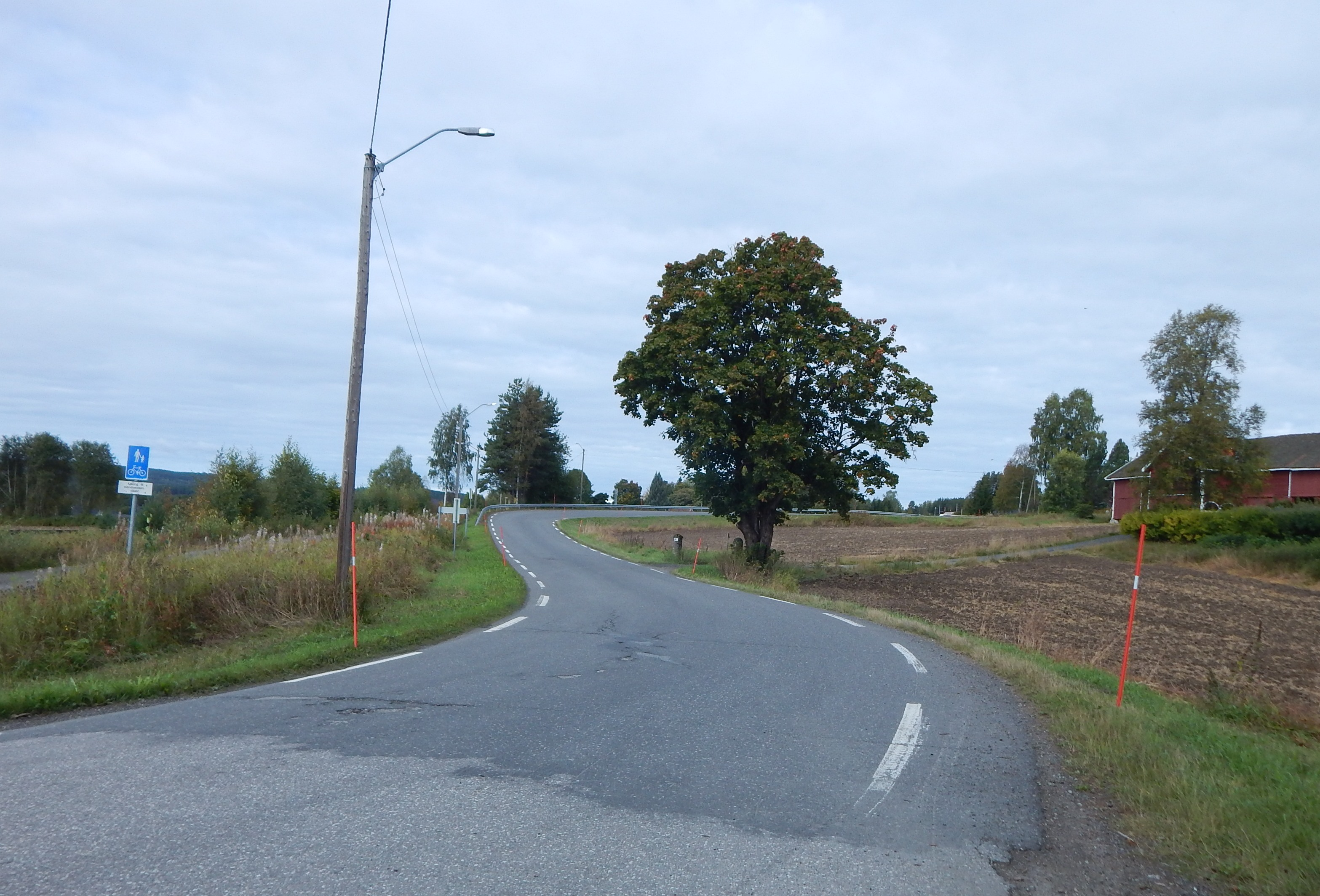 Nøtåsvegen (fylkesvei 530) øst for Solørbanen nær Heradsbygd stasjon